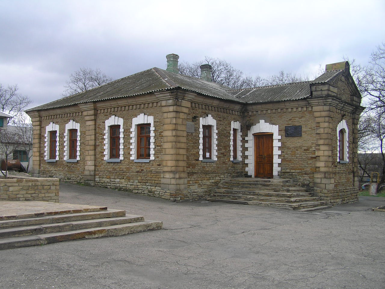 Будинок народної школи, в якій працював Б.Д. Грінченко, Михайлівка, вул. Грінченка, 8